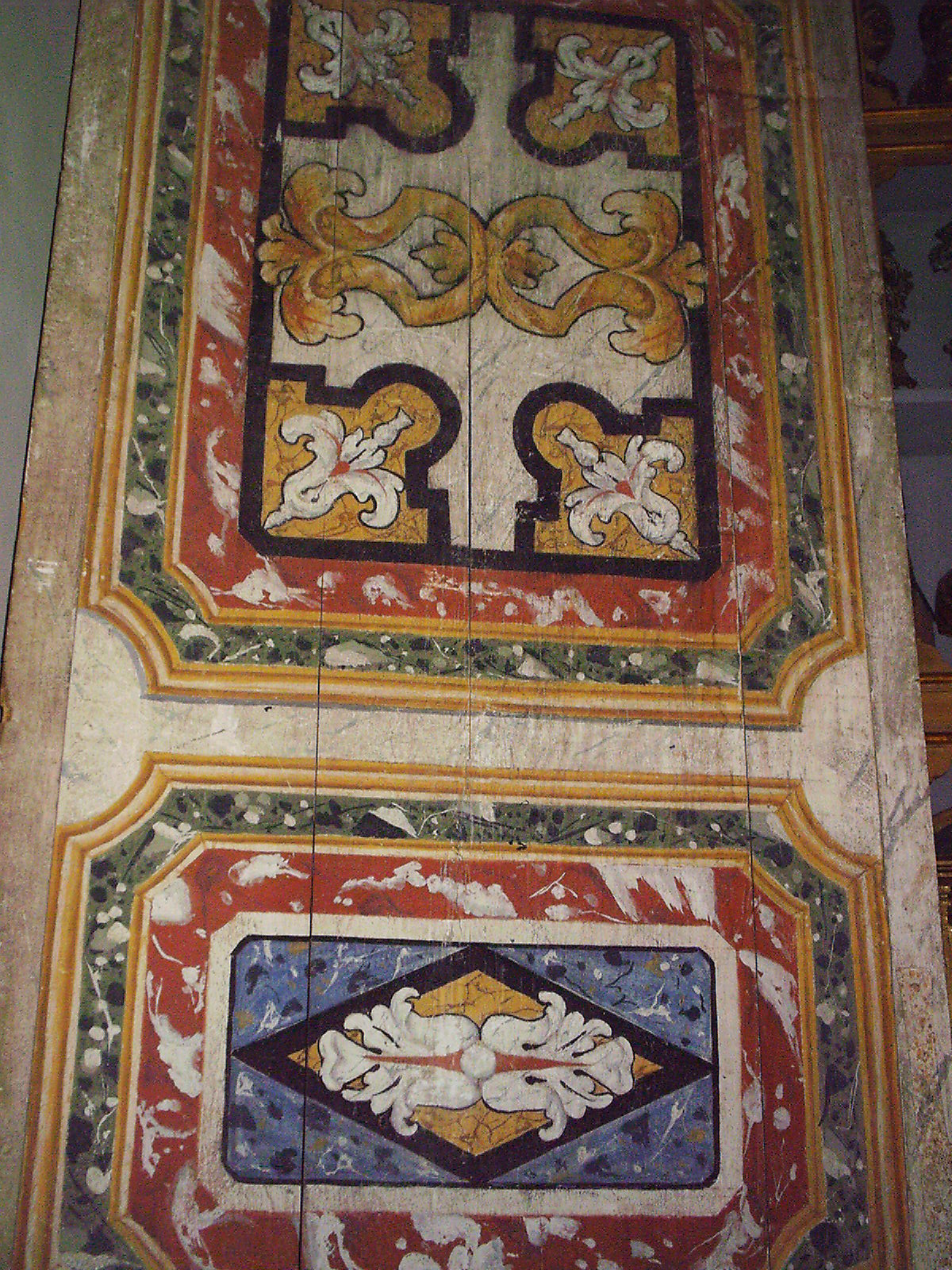 Anta di chiusura della chiesa della Madonna della Valle di Scanno